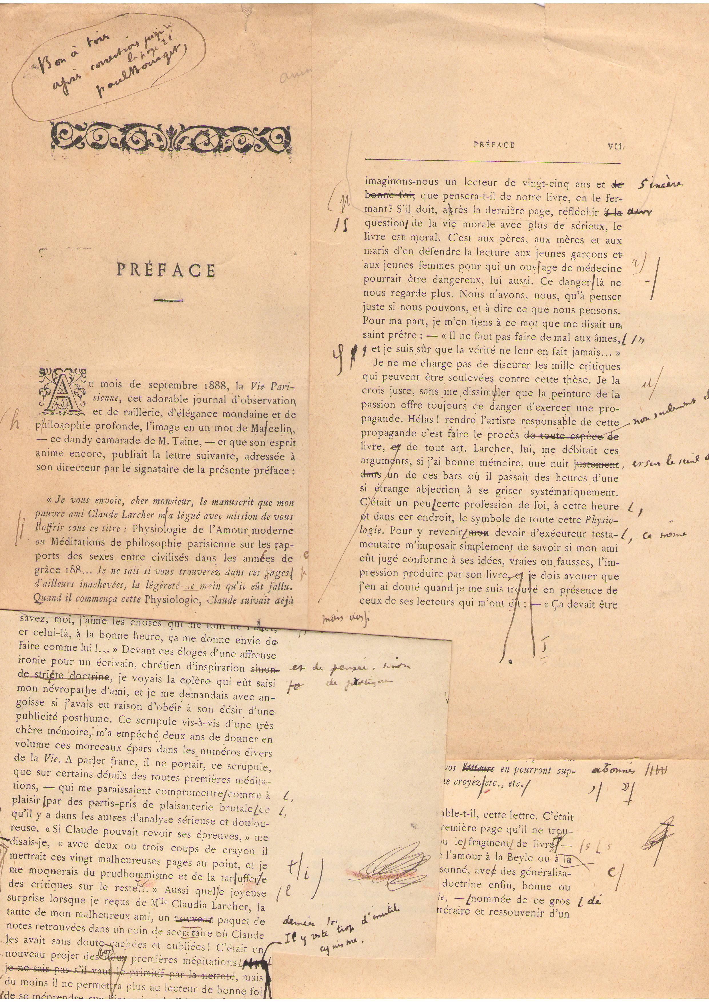 Manuscrit original